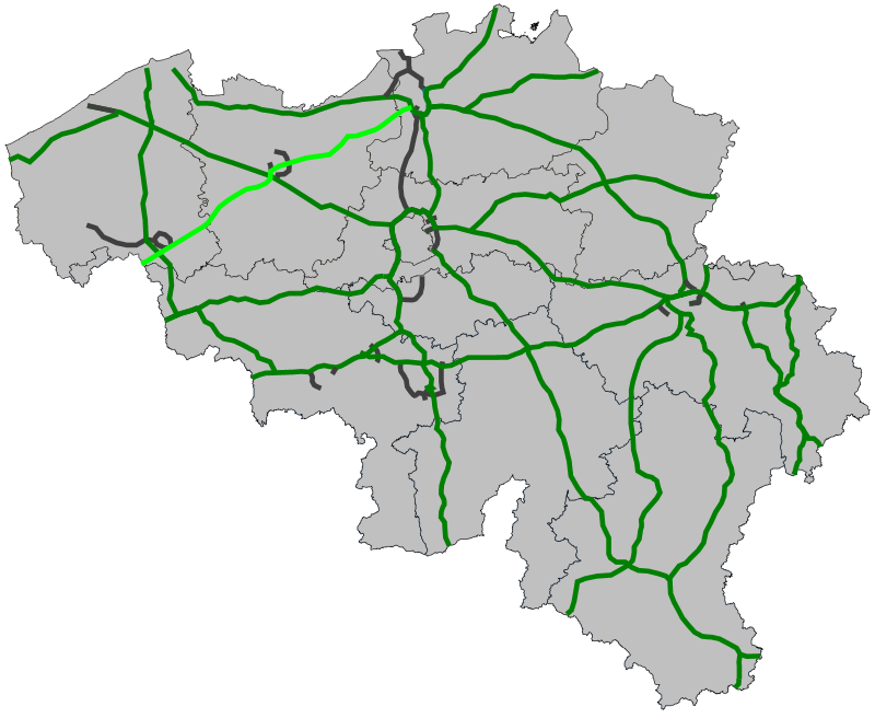 Traject Europese weg 17 in België